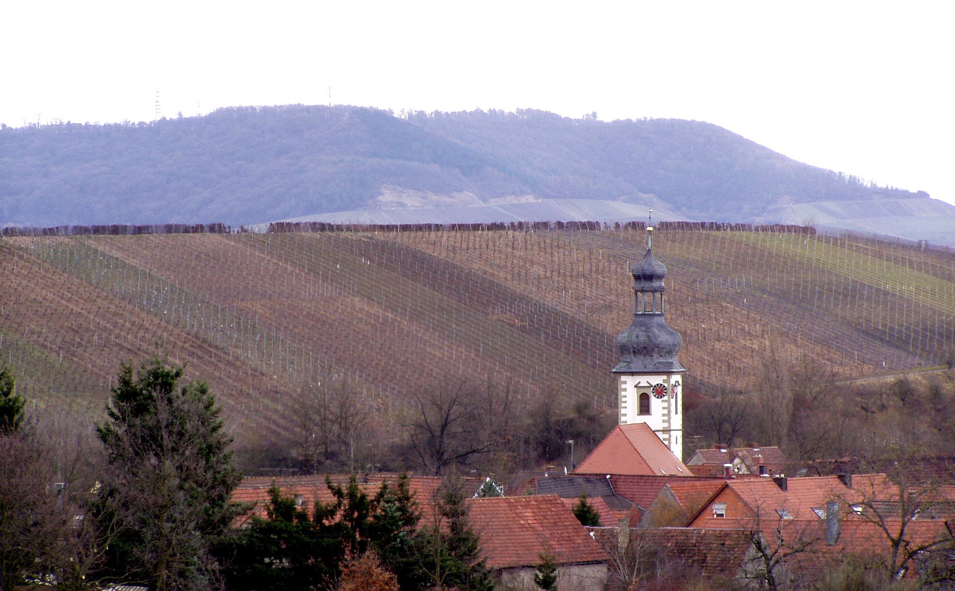 Ortsteil Sickershausen mit evangelischer Johanneskirche